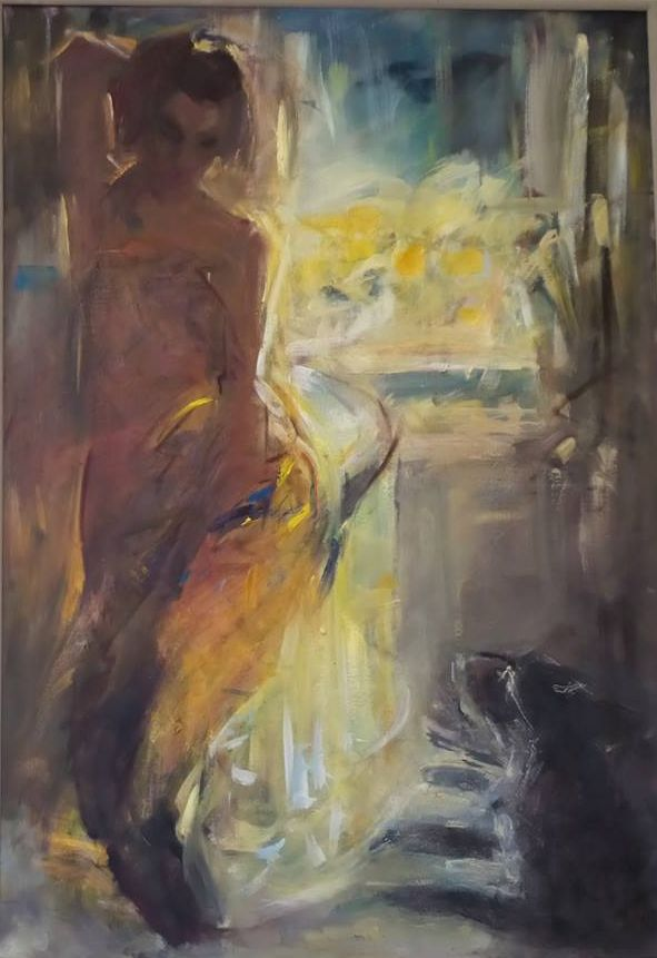 Obraz Malarka III Autor: Jadwiga Maria Jarosiewicz 100 x 70cm